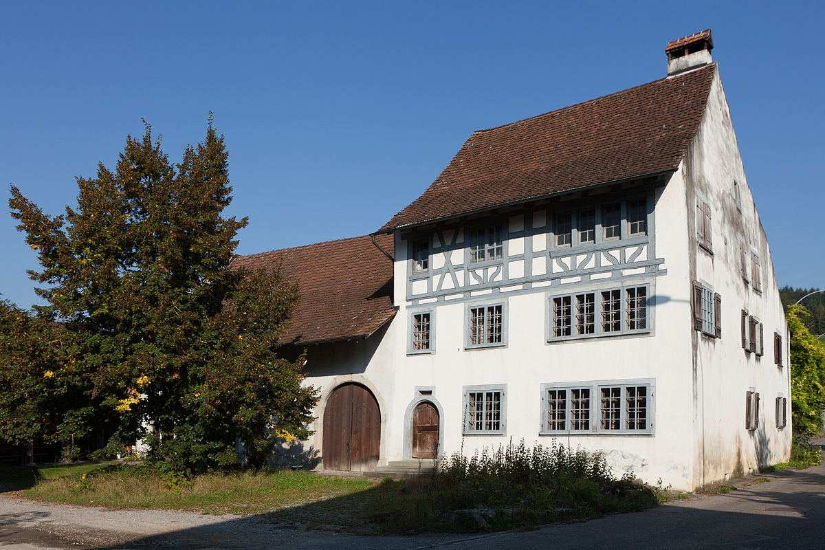 Das alte Gerichtshaus (ehemaliger Meierhof) in Tegerfelden (AG)